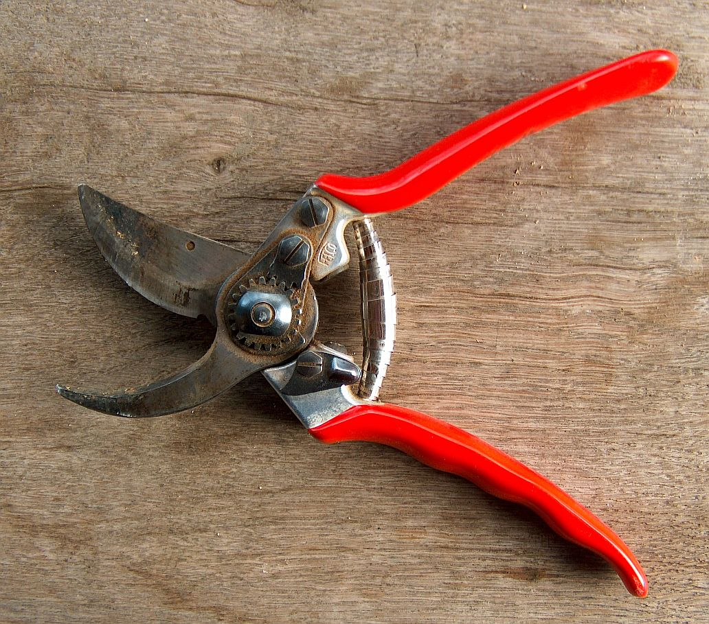 Rebschere Felco 11